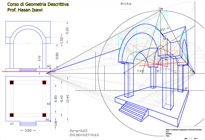 esercitazioni di Geometria descrittiva- Prof. Hasan Isawi- La Facoltà di Architettura "Valle Giulia"- Università “La Sapienza. prospettiva a quadro verticale di una pedana sormontata da una copertura che ha per intradosso una volta a crociera e per estradosso una volta a botte sezionata da due falde inclinate perspective, with a vertical plan projection, of platform topped by a roof which have a cross vault as internal coverage and a barrel vault sections by two inclined planes as external coverage. منظور, بمستوى اسقاط رأسي, لمنصة تعلوها تغطية والتي جزءها الداخلي مكون قبو اسطواني , والخارجي من باكية مقطوعة بمستويين مائليين متماثلين هذا الرسمة تم إنشائها وتحميلها من قبل المهندس البروفسور حسن العيسوي